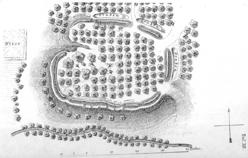 Schlosswall bei Werder 1868 aus: Rudolf Baier, Die Burgwälle der Insel Rügen nach den auf Befehl Sr. Majestät des Königs im Sommer 1868 unternommenen Untersuchungen, in Baltische Studien AF 24, Stettin 1872, Tafel XII.